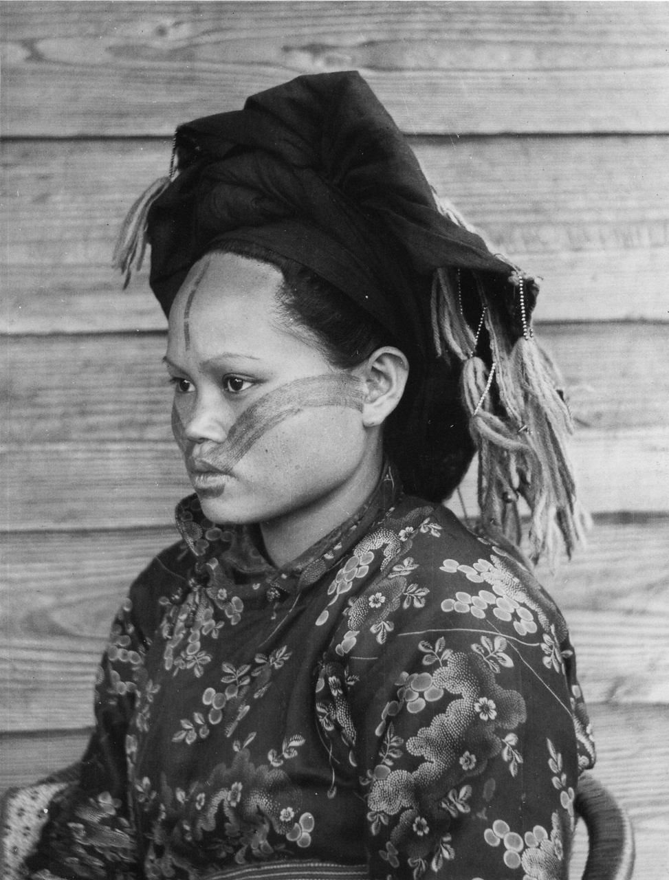 鳥居龍藏所攝紋面泰雅族女人